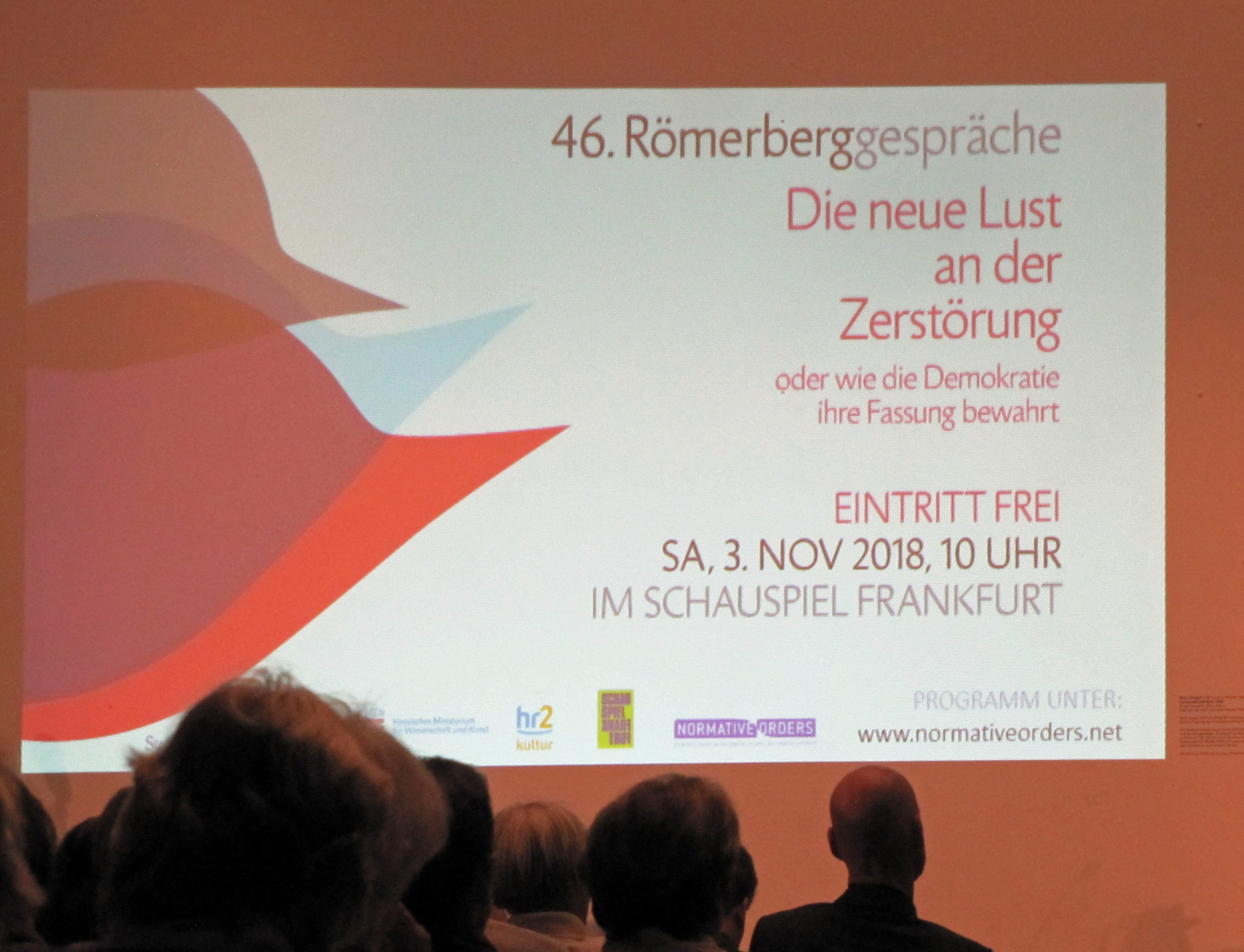 Thema der 46. Römerberggespräche: Die neue Lust an der Zerstörung oder wie die Demokratie ihre Fassung bewahrt, am 3. November 2018 im Chagall-Saal des Schauspielhauses in Frankfurt am Main.